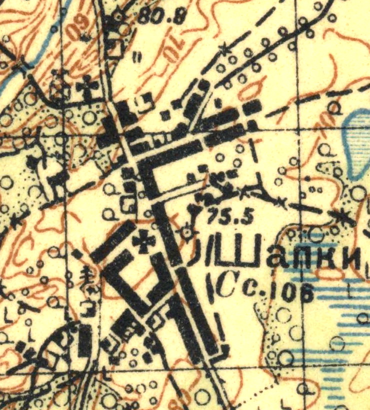 Топографическая карта Ленинградской области, квадрат О-36-15-А (Шапки), деревня Шапки